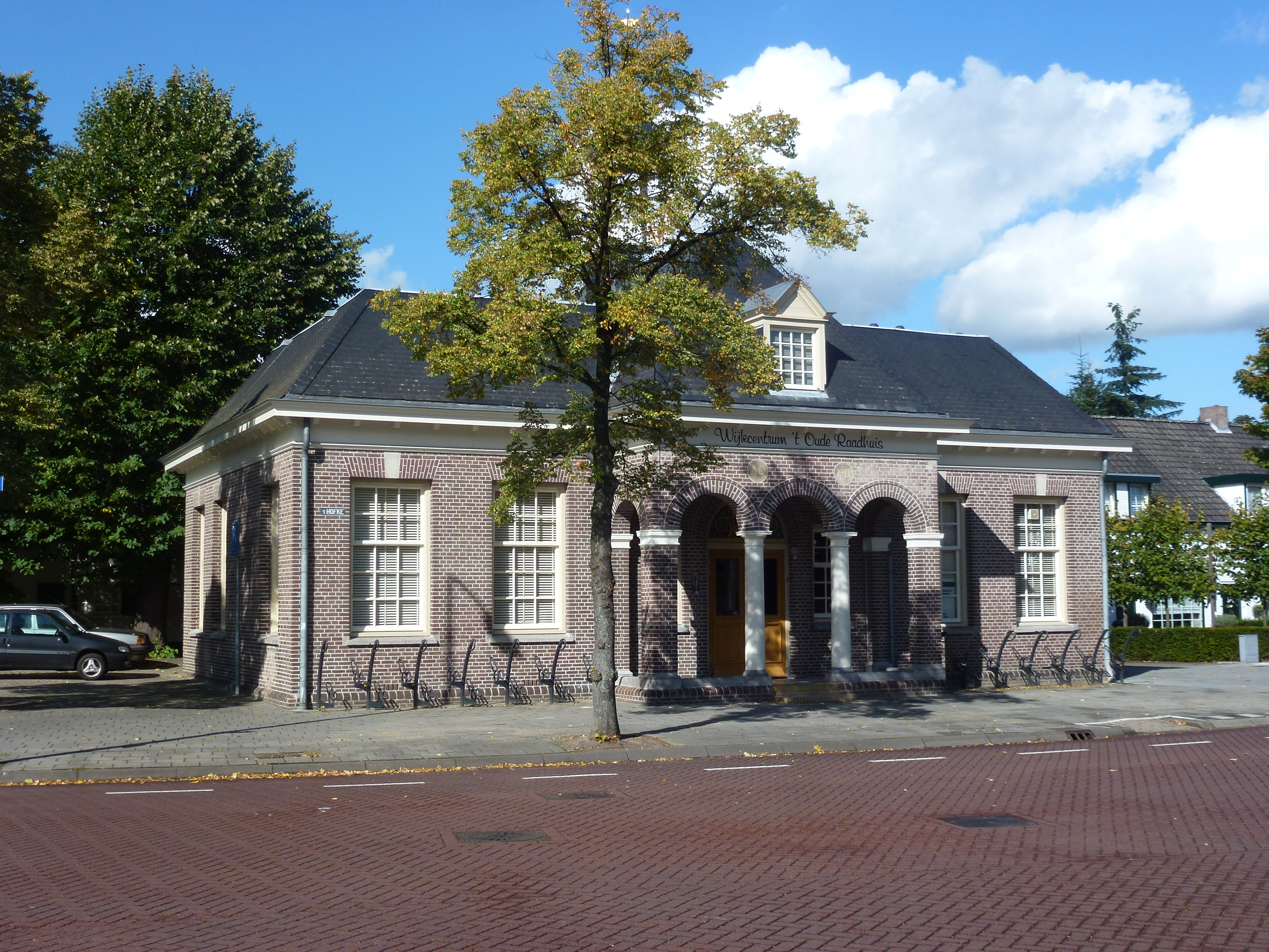 Wijkcentrum 't Oude Raadhuis Tongelre Eindhoven